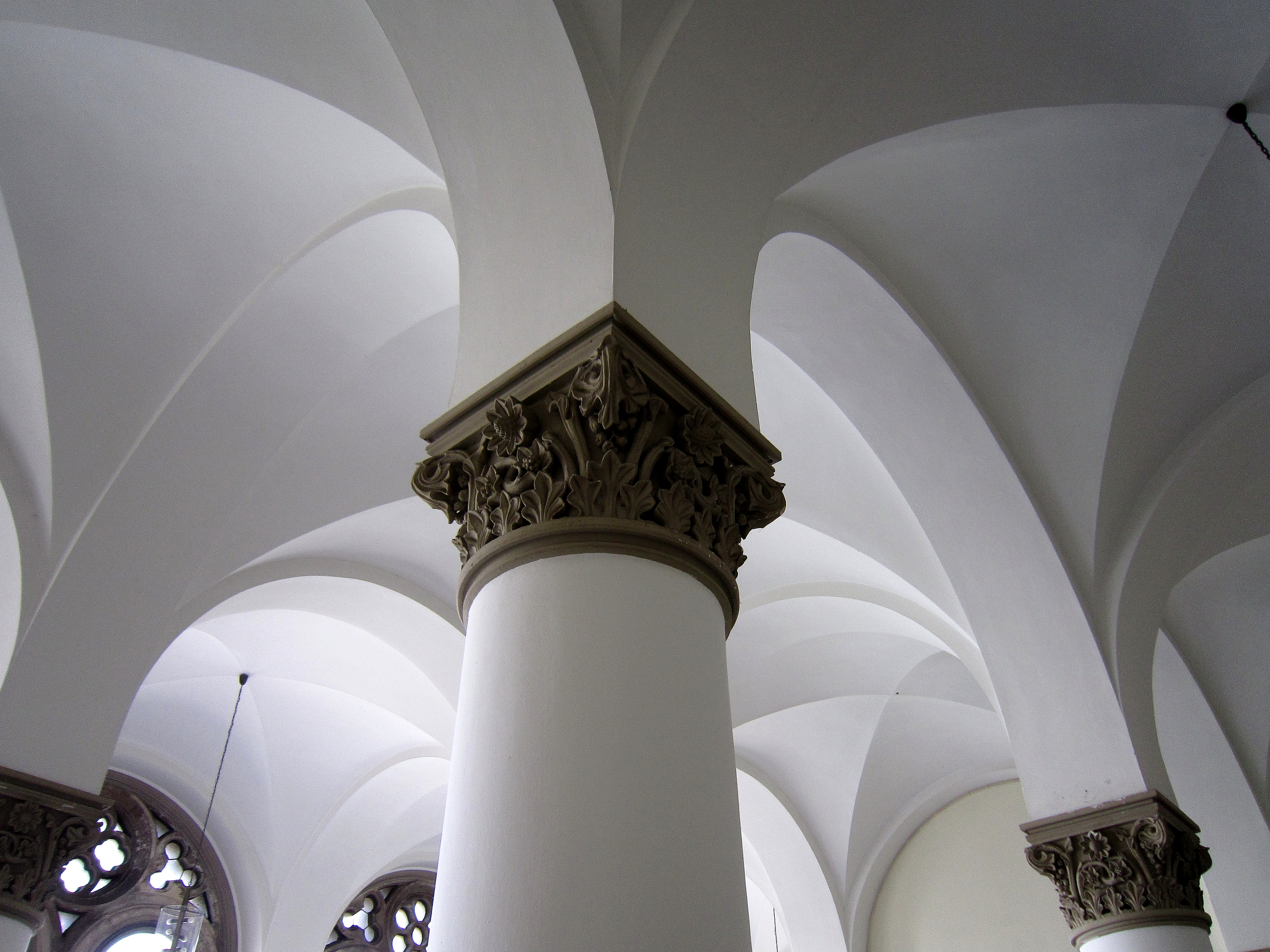 Säulenhalle im 1.OG des Hauptgebäudes der Ludwig-Maximilians-Universität München Gärtner Kapitell Detail